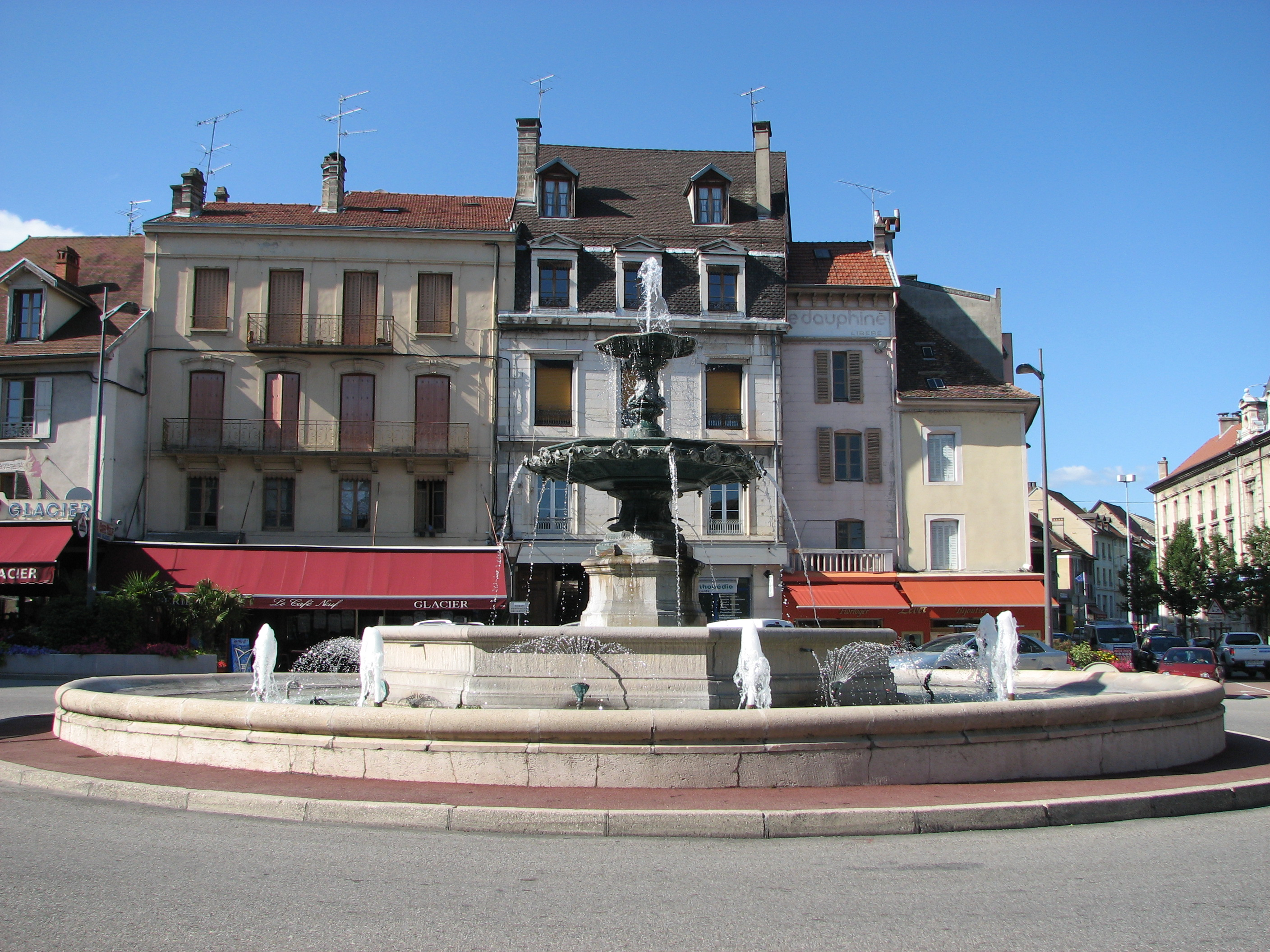 Place des Terreaux, à Belley (Ain)